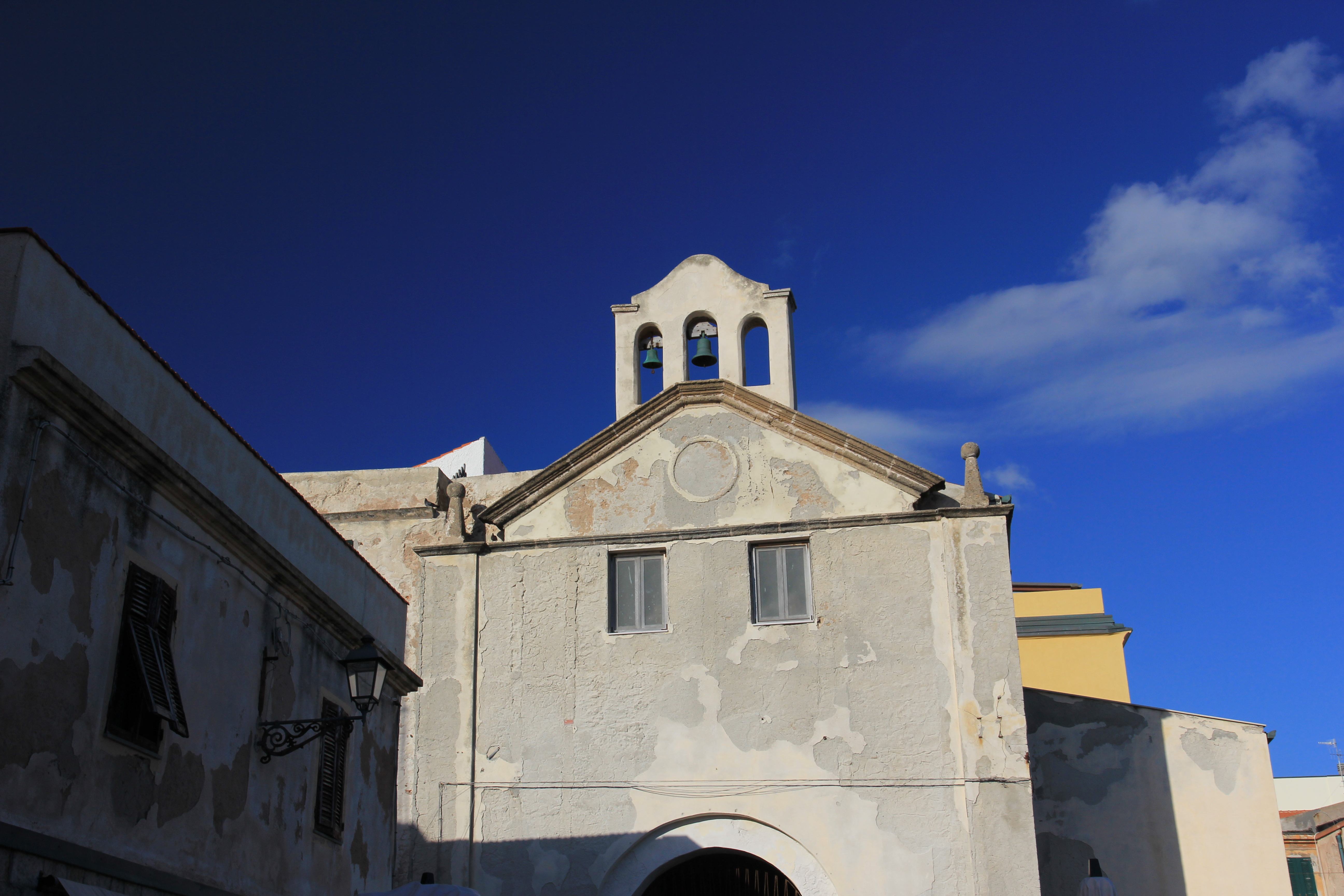 Alghero - Chiesa di Nostra Signora del Carmelo